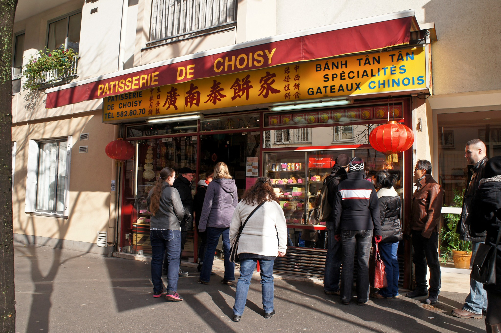 Patisserie de Choisy, 62 Avenue de Choisy.